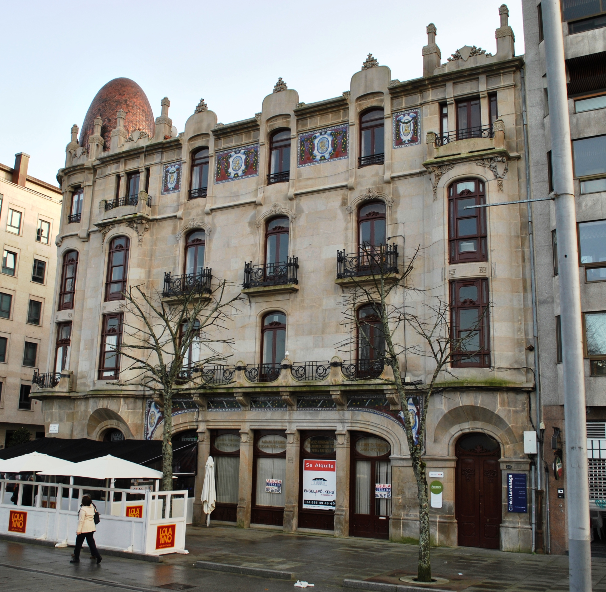 Véxase o título e as categorías